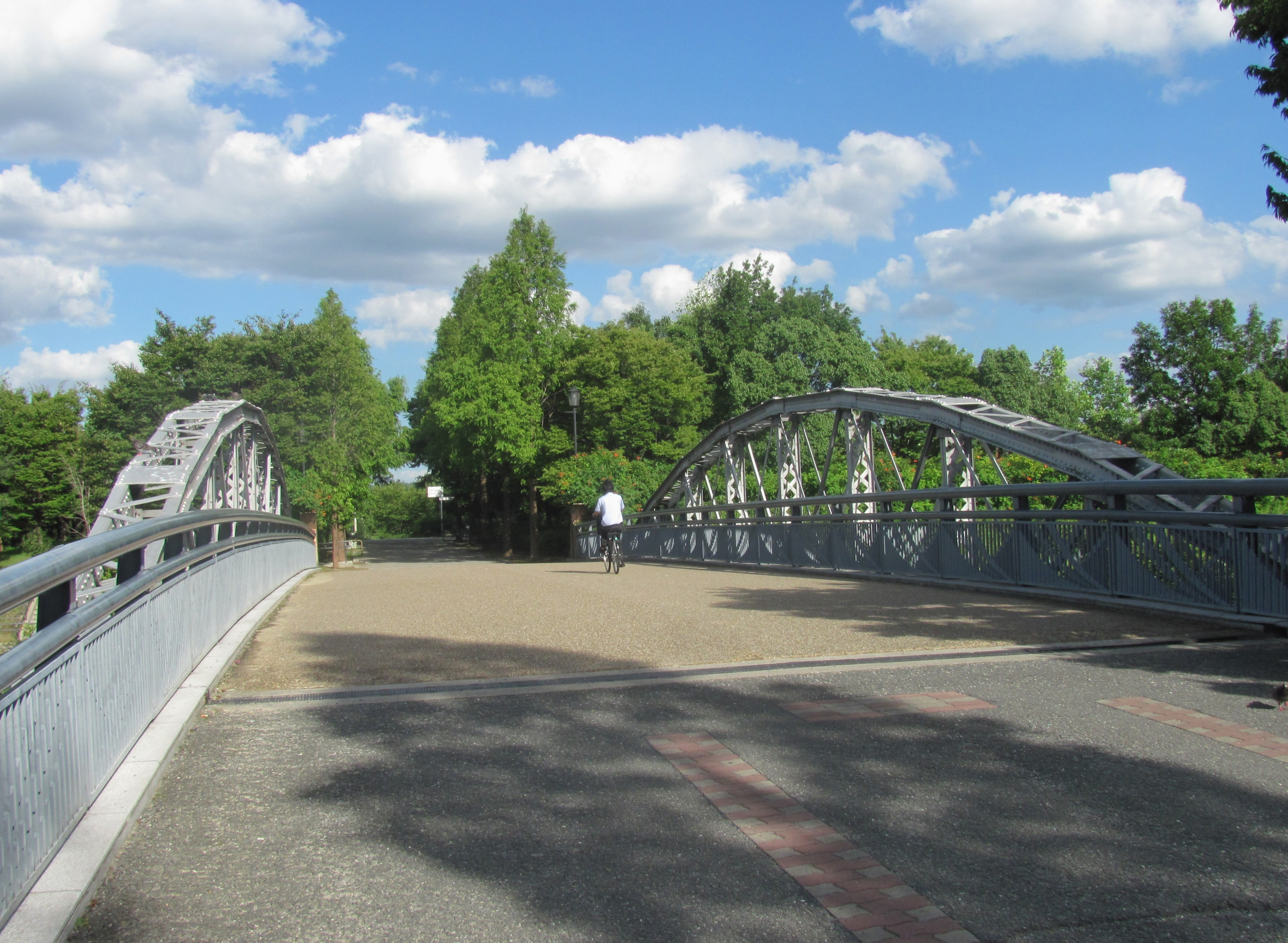 大阪市鶴見区、鶴見緑地公園の緑地西橋。明治6年に架橋された心斎橋の一部が再利用されている。